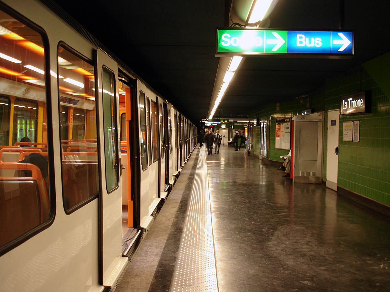 Station La Timone du métro de Marseille, France.